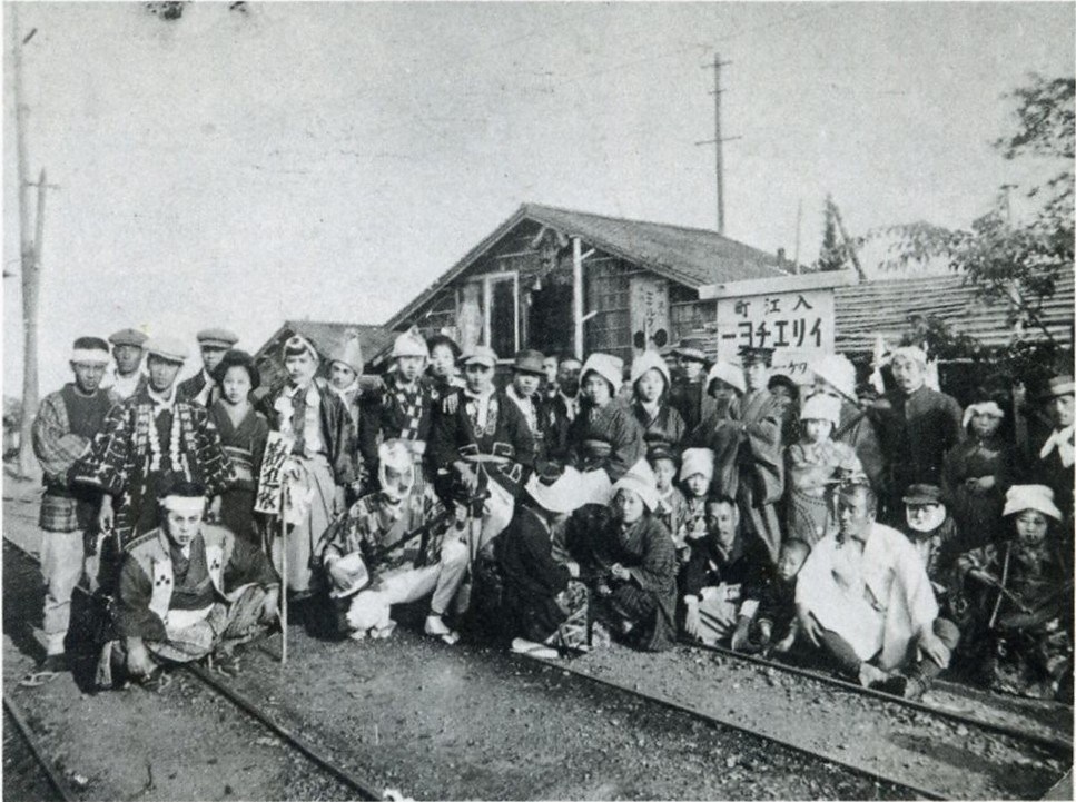 大日本軌道(現・静岡鉄道静岡清水線)入江町駅での、ある町工場の従業員と家族の花見行の記念写真。余興で「勧進帳」をやるのだろうか。列車が来るにはまだまだ時間があったようだ。